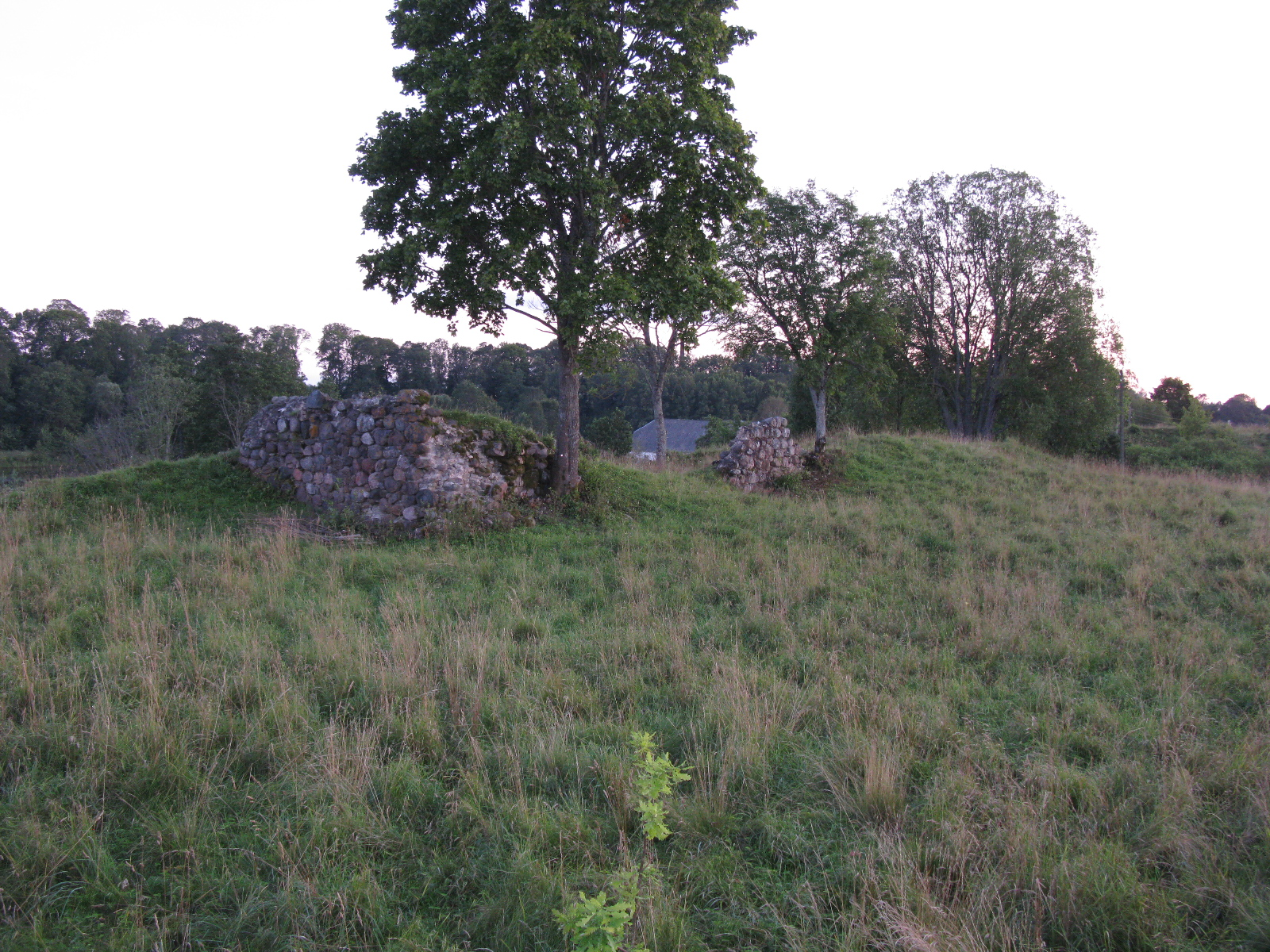 Lõunapoolne hoonetiib.